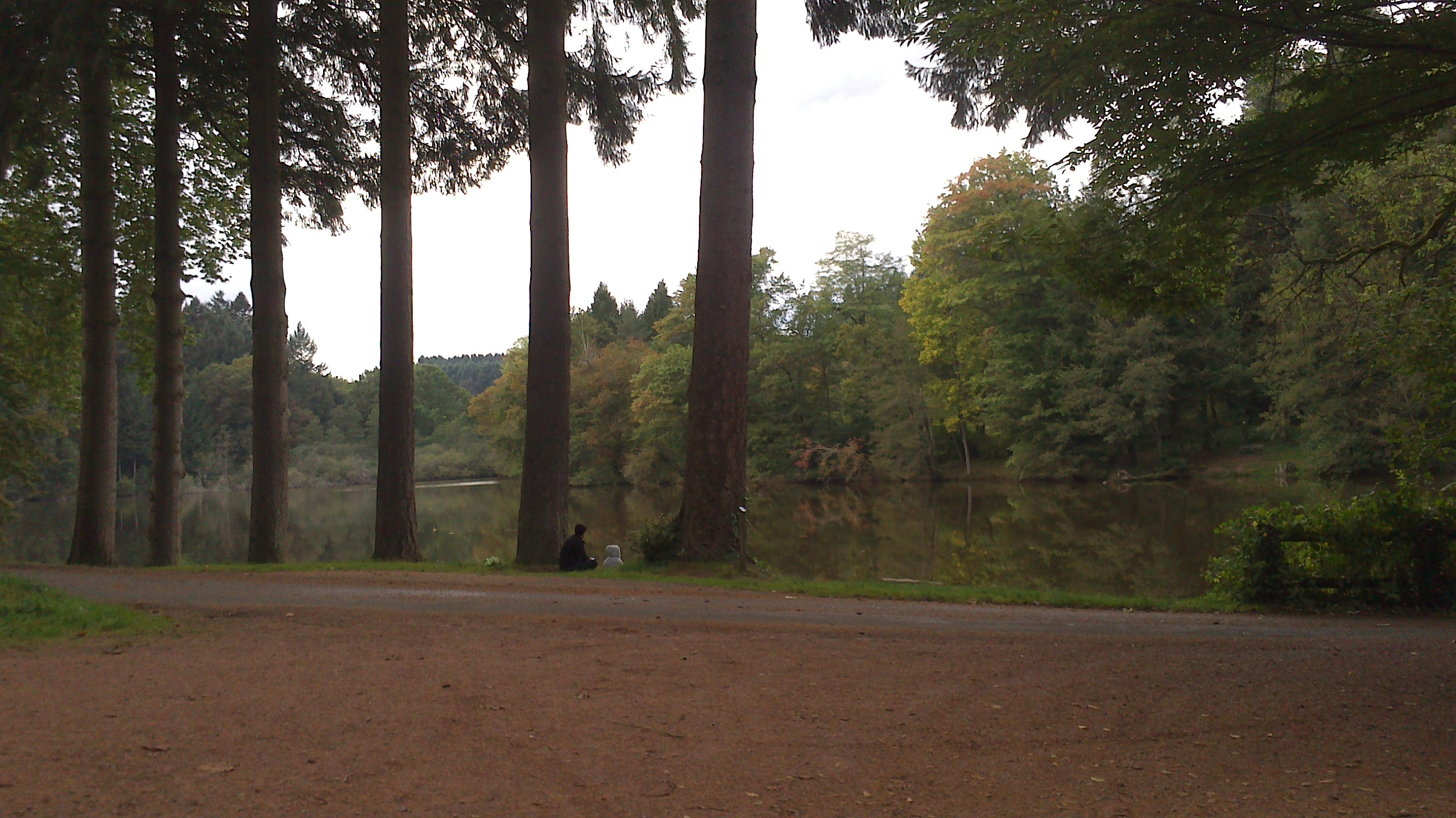 Vu sur le lac en automne